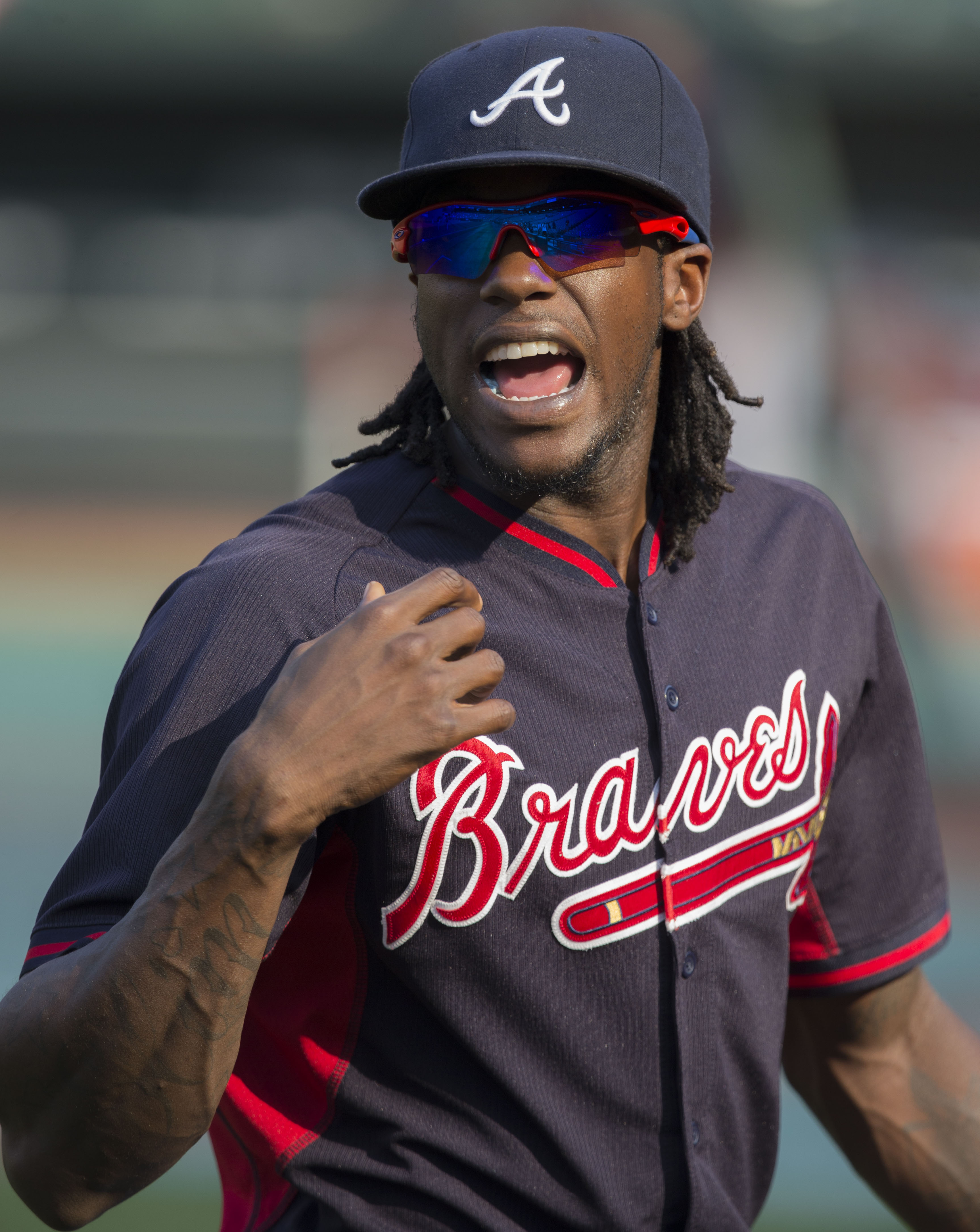 Cameron Maybin